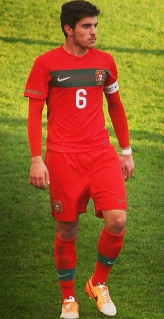 Ruben Neves avec le Portugal